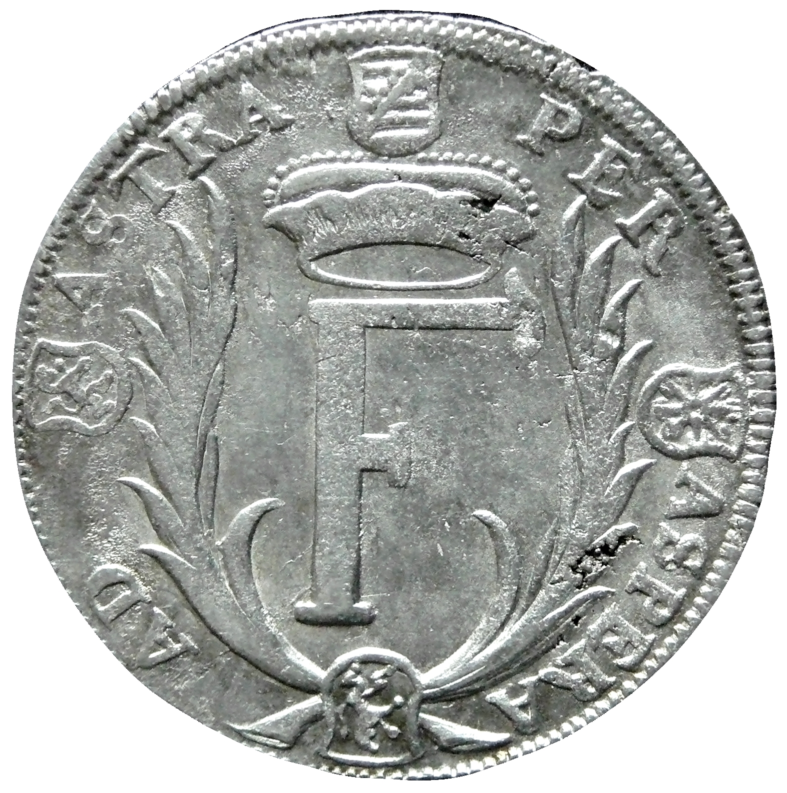 Zweidrittelthaler (Gulden) 1679 Friedrich I. Herzog von Sachsen-Gotha und Altenburg (1675-1691) Prägung gemäß Münzvertrag von Zinna der Kurfürsten von Brandenburg und Sachsen vom 27. August 1667; Prägung im 10½-Taler-Münzfuß von Zinna, jedoch mit dem geringwertigeren Silbergehalt Münzstätte und Prägezeitraum: Prägung 1678 und 1679 in mehreren Varianten, Münzstätte Gotha, Georg Friedrich Staude Münzmeister im Amt von 1677 bis 1680 Wert und Unterteilung bei vollwertigem Kleingeld: = ⅔ Reichszähltaler = 16 Gute Groschen = ½ Speziestaler = 1 Gulden = 16 Groschen = 60 Kreuzer = 192 Pfennige Beschreibung Revers: Unter einem Herzogshut große Initiale des Regenten F zwischen zwei Palmzweigen, vier kleine Wappenschilder am Rand jeweils nach einem Viertel mit den Wappen der Herzogtümer Sachsen, Kleve, Jülich und Berg, dazwischen die oben rechts beginnende Umschrift: PER / ASPERA / AD / ASTRA = lateinische Redewendung, wörtlich: „Durch das Raue zu den Sternen“, sie bedeutet: „Über raue Pfade gelangt man zu den Sternen“ oder „Durch Mühsal gelangt man zu den Sternen“.